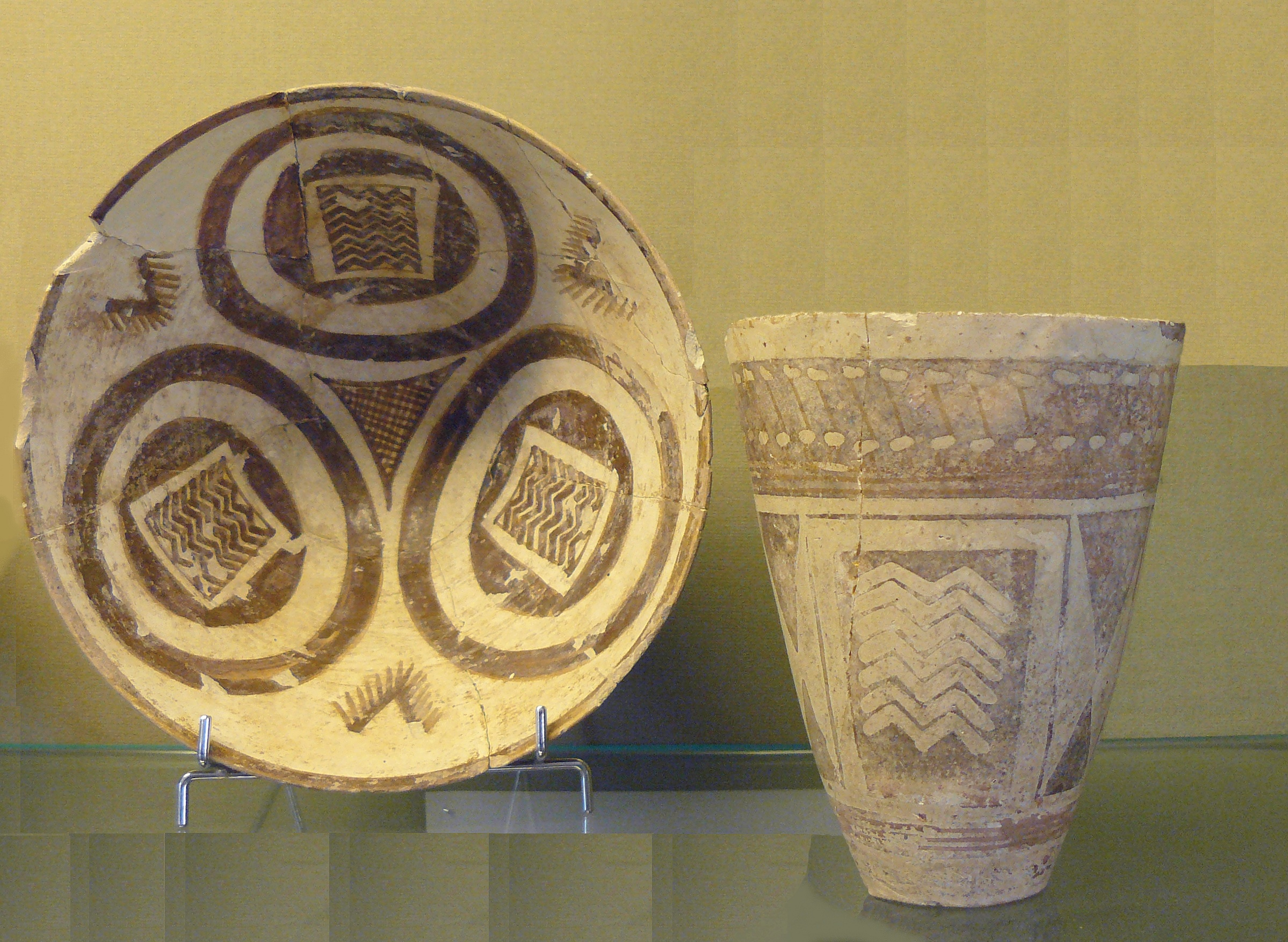 Gobelet et coupe, Iran, époque Obeid (Suse I, IVème millénaire avant J.C.) - peinture mate, hauteur du gobelet environ 12 cm - Musée national de céramique, Sèvres (Hauts-de-Seine, France) - Inv n° MNC 16774 et 16775